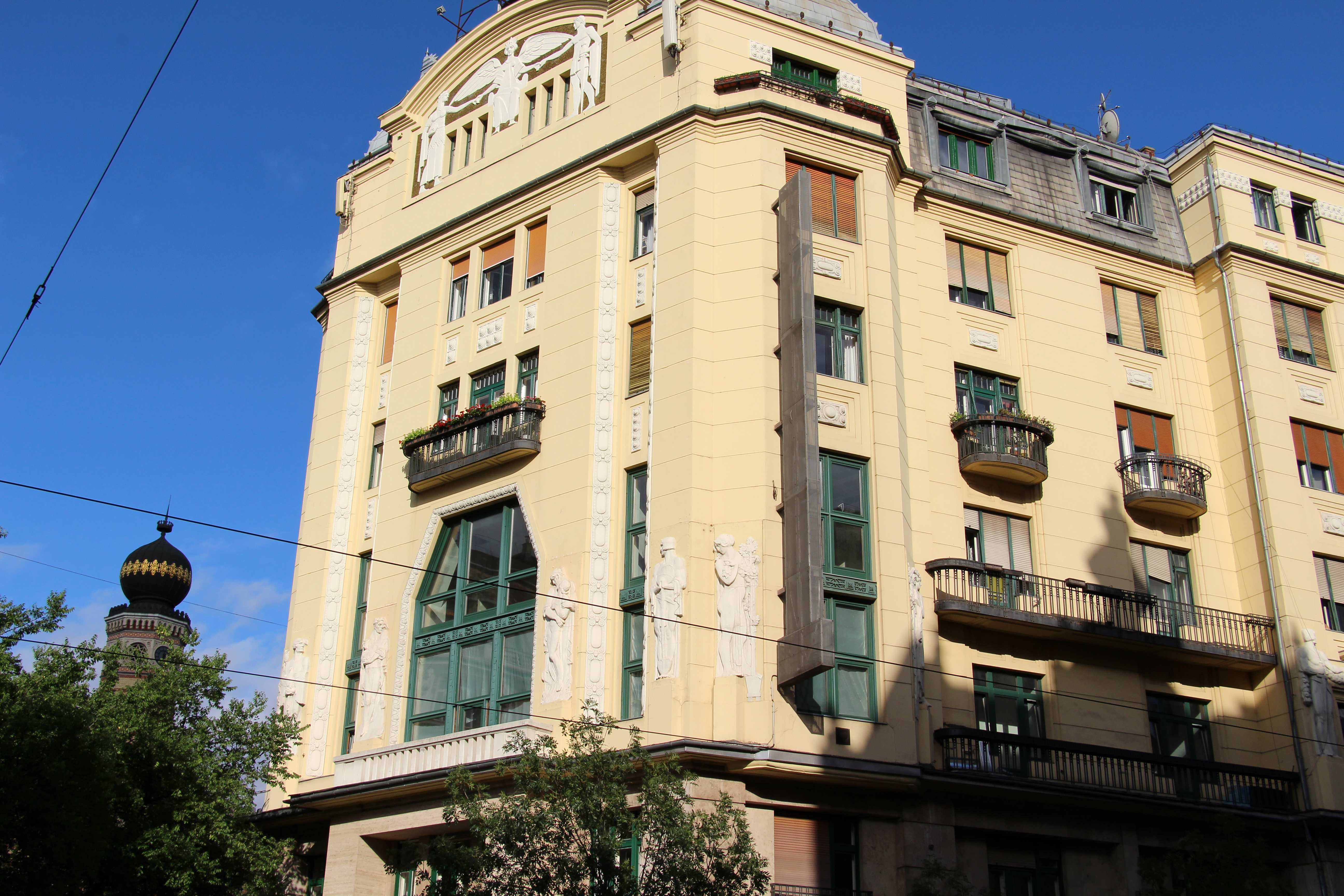 Erzsébetváros - Károly körút Viktória Insurance Company building. Hungarian secession. Arch. Guido Hoepfner and Géza Györgyi 1912